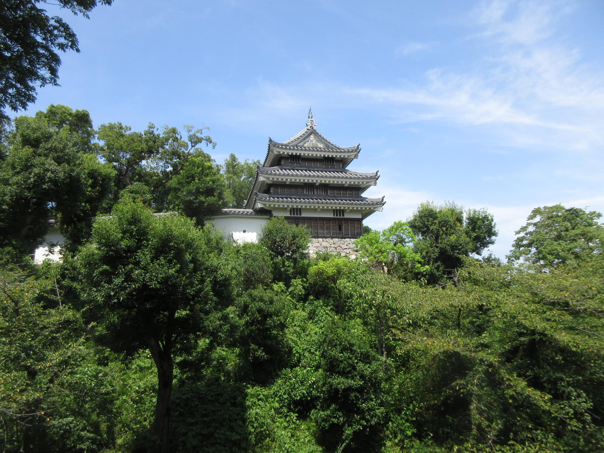 1996年に復元された西尾城本丸丑寅櫓